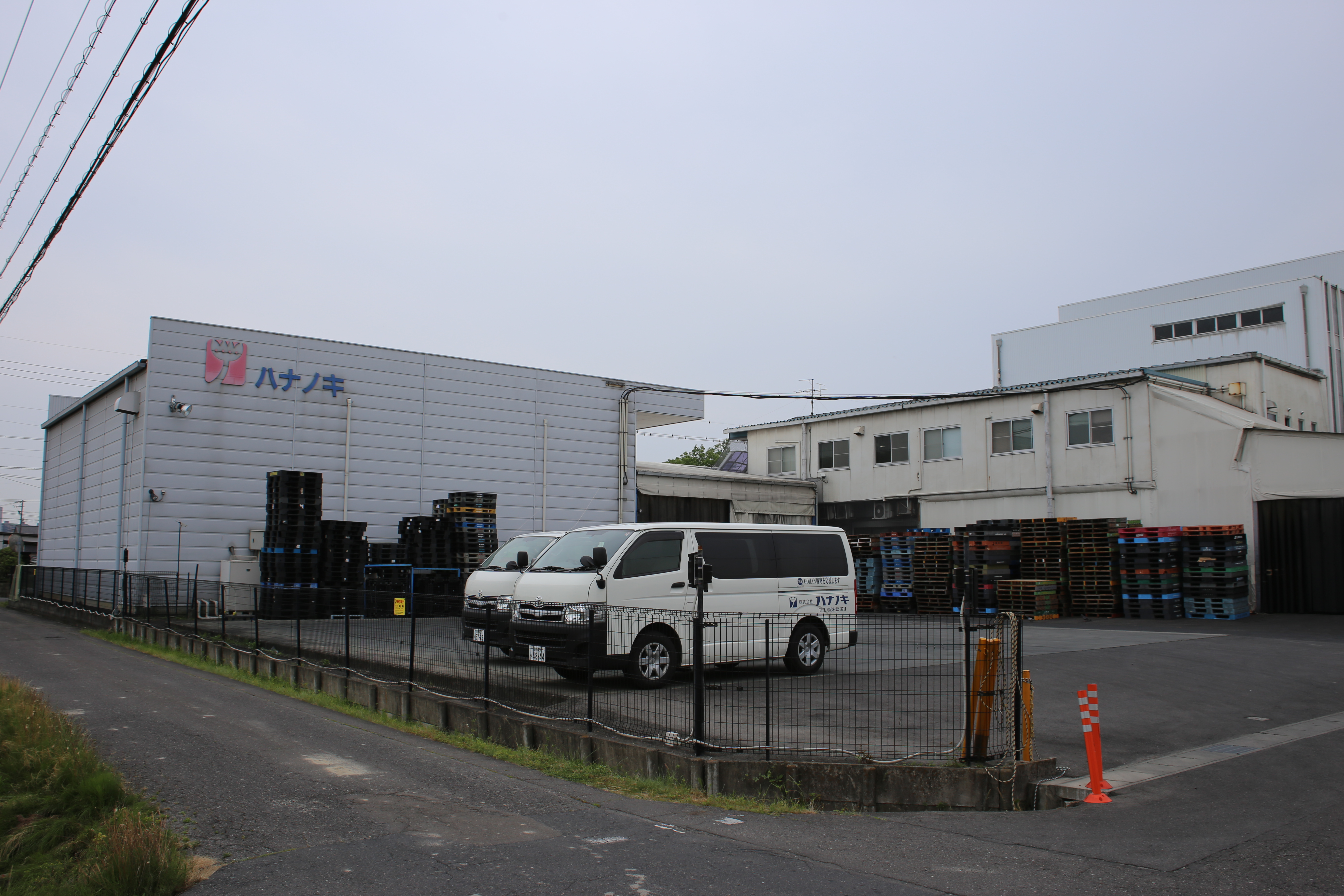 愛知県北名古屋市井瀬木井の元に所在するハナノキ本社を北側公道東側より撮影